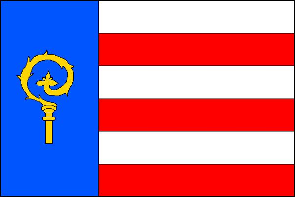 Vlajka města Měčín